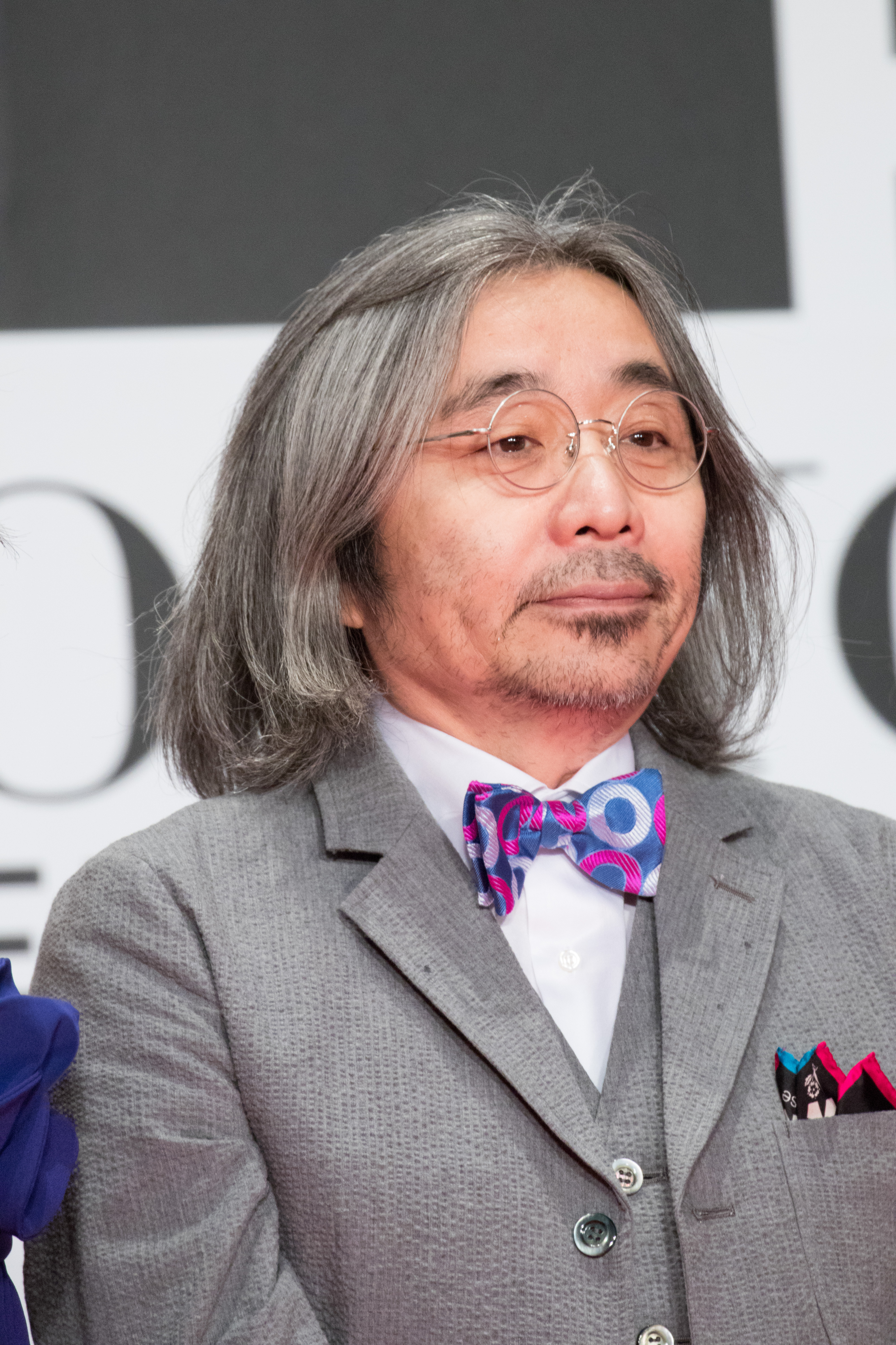 第29回 東京国際映画祭 オープニングセレモニー 安齋肇 (変態だ)